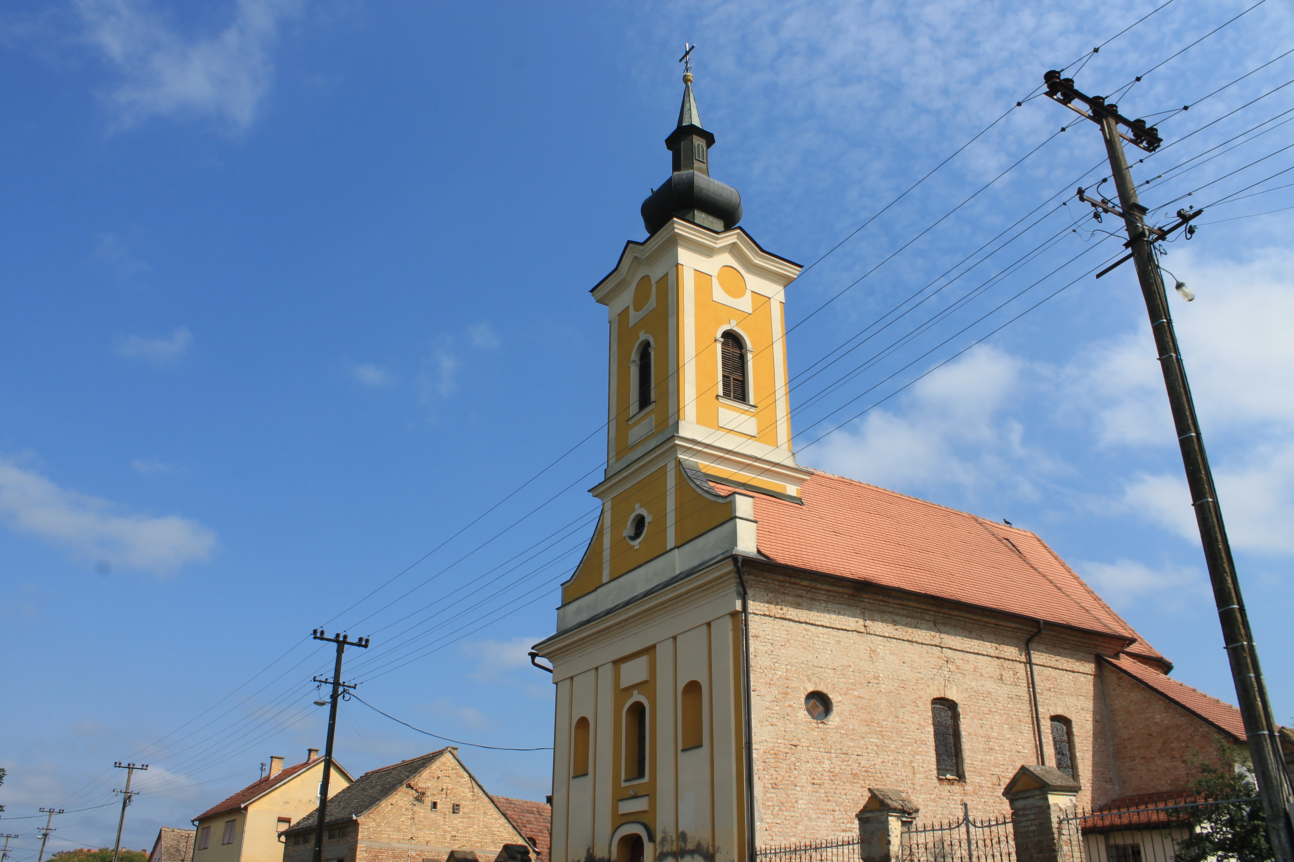 Rimokatolička crkva u Moroviću